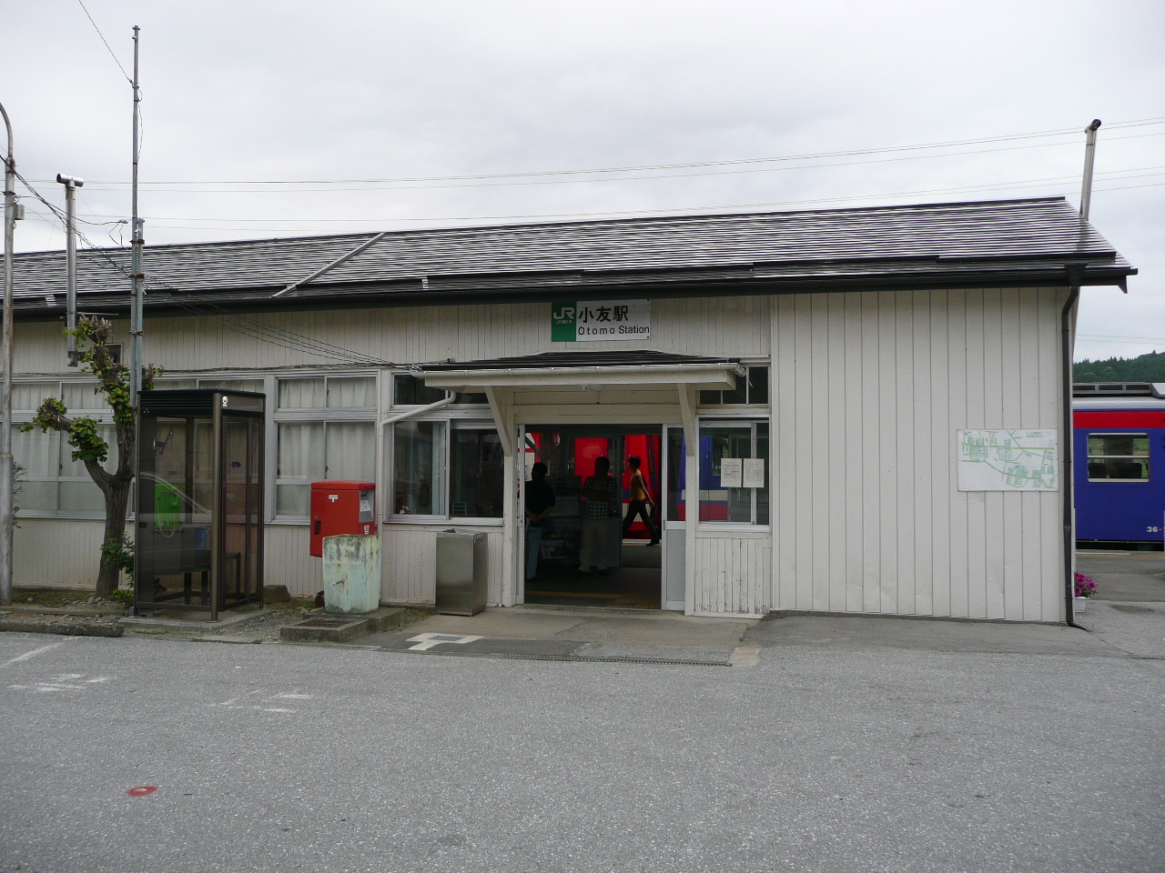 小友駅。撮影場所：駅前広場より。